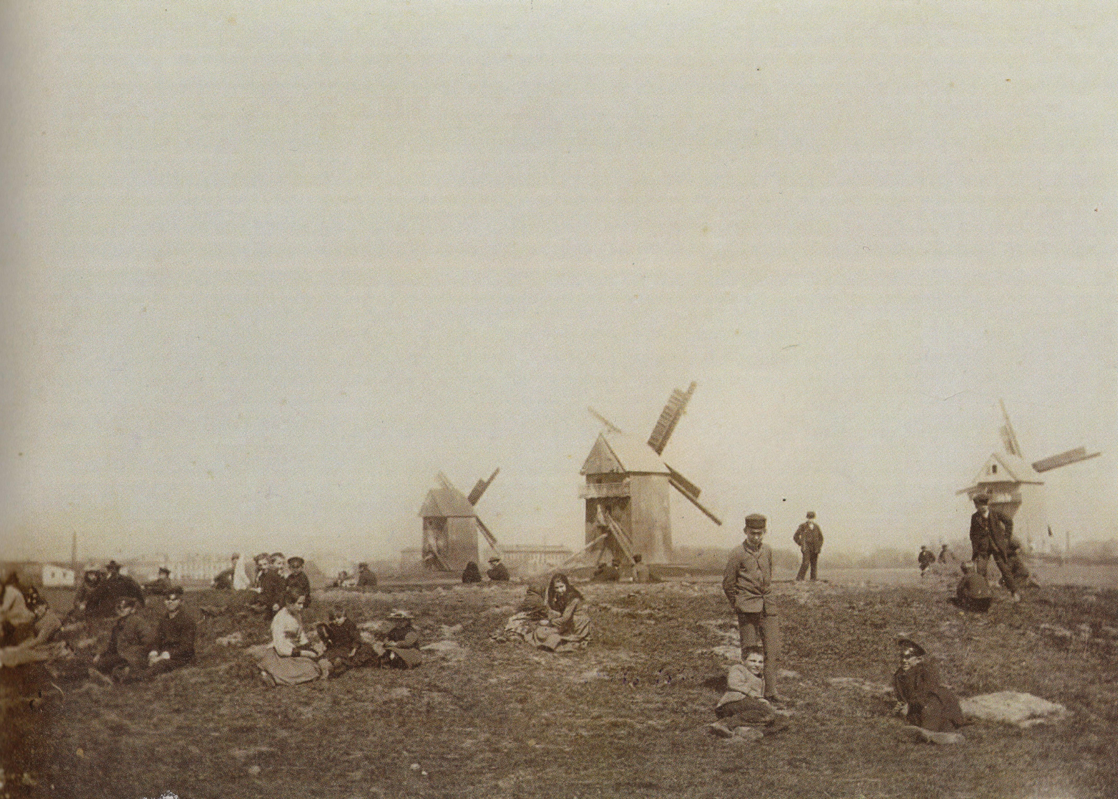 Mieszkańcy Woli w czasie świątecznego wypoczynku